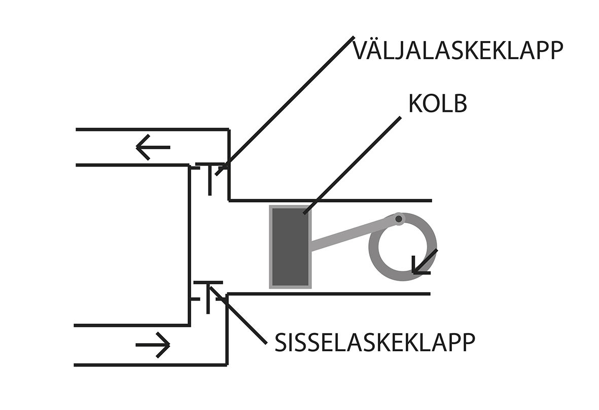 Kolbpumba tööpõhimõte